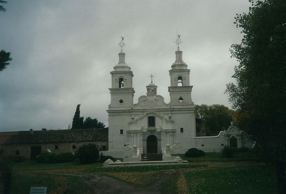 Fachada de la iglesia de la estancia de Santa Catalina.